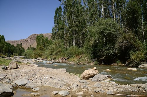 Salams Zola çayı